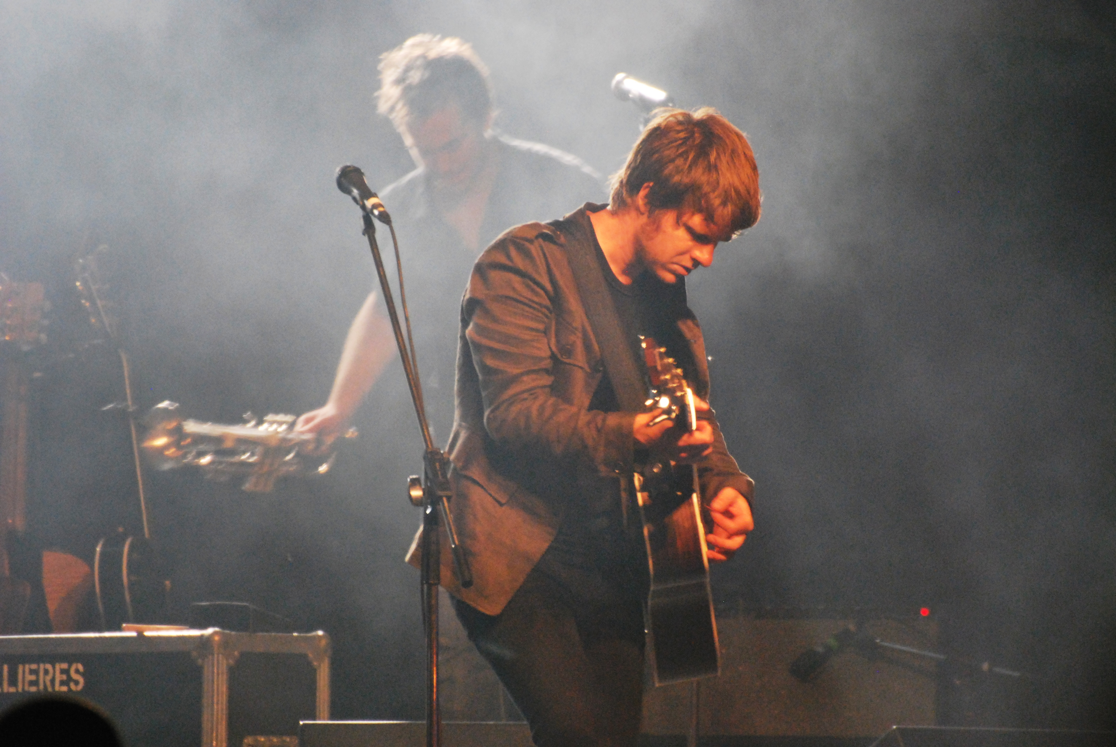 Vincent Vallières à Jonquière.